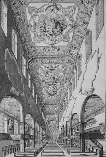 Barfüßerkirche Augsburg; Kupferstich